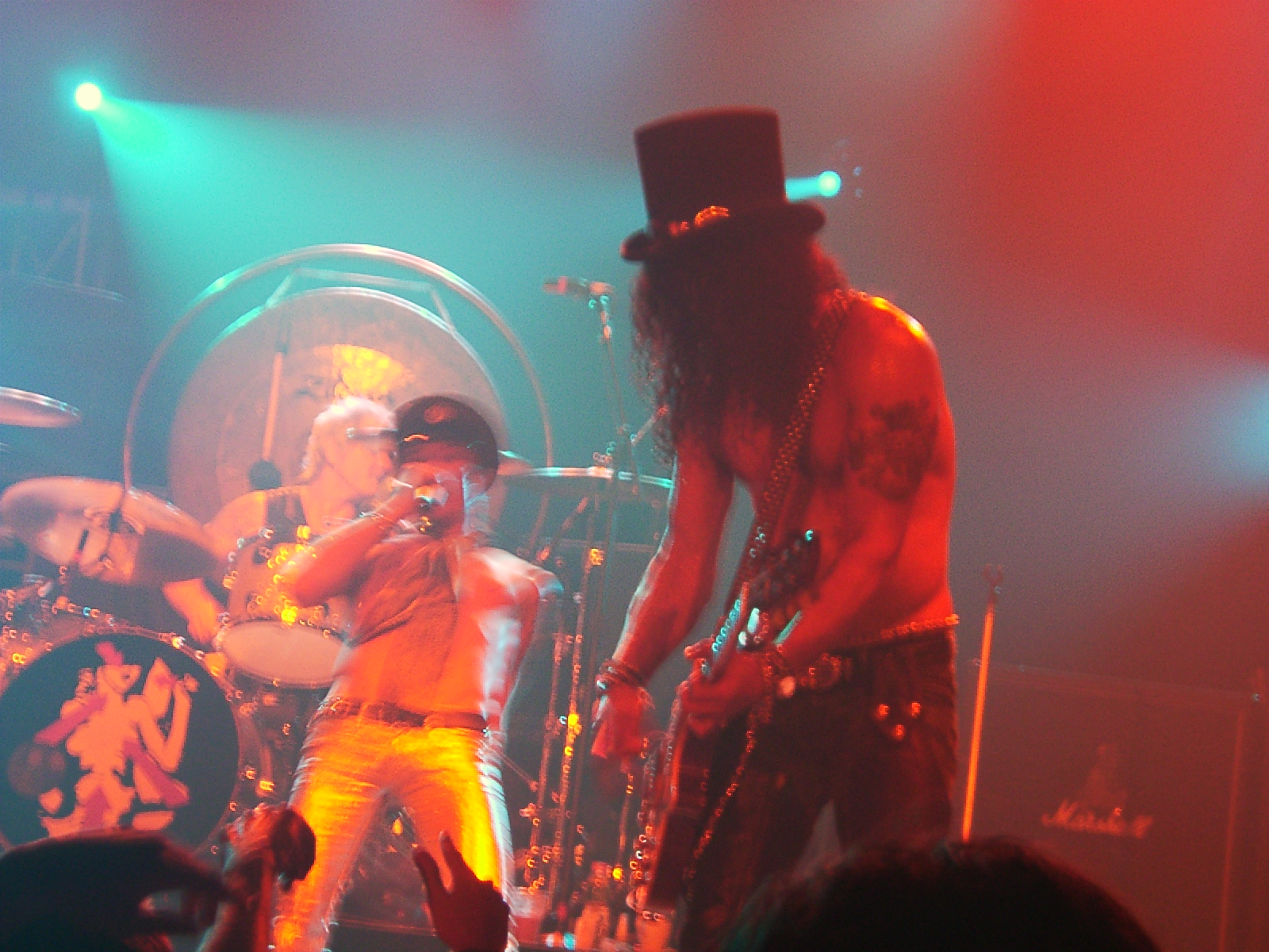 Velvet Revolver in concert in Stockholm